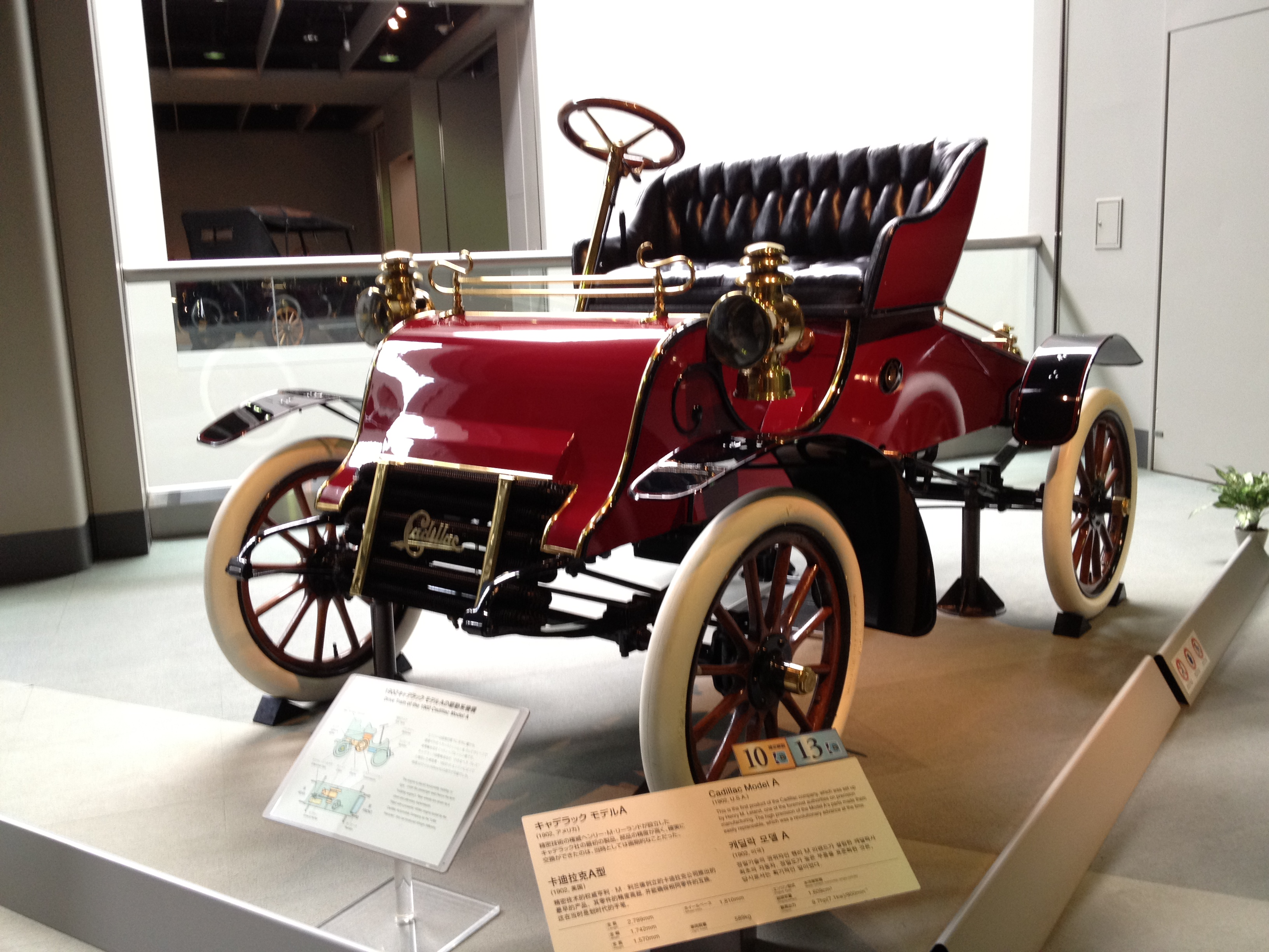 1902 Cadillac Model A Toyota Automobile Museum